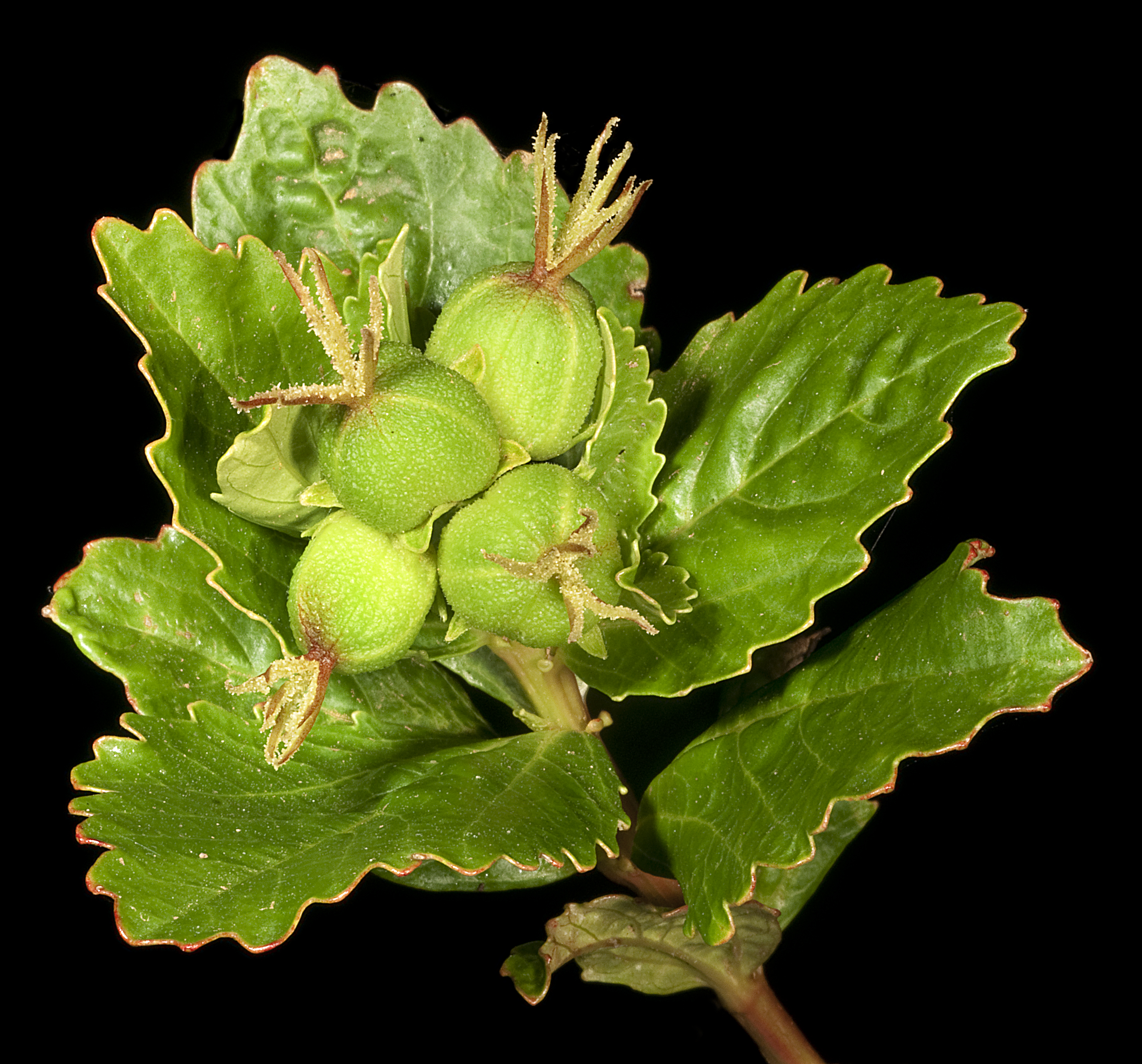 KRT4050